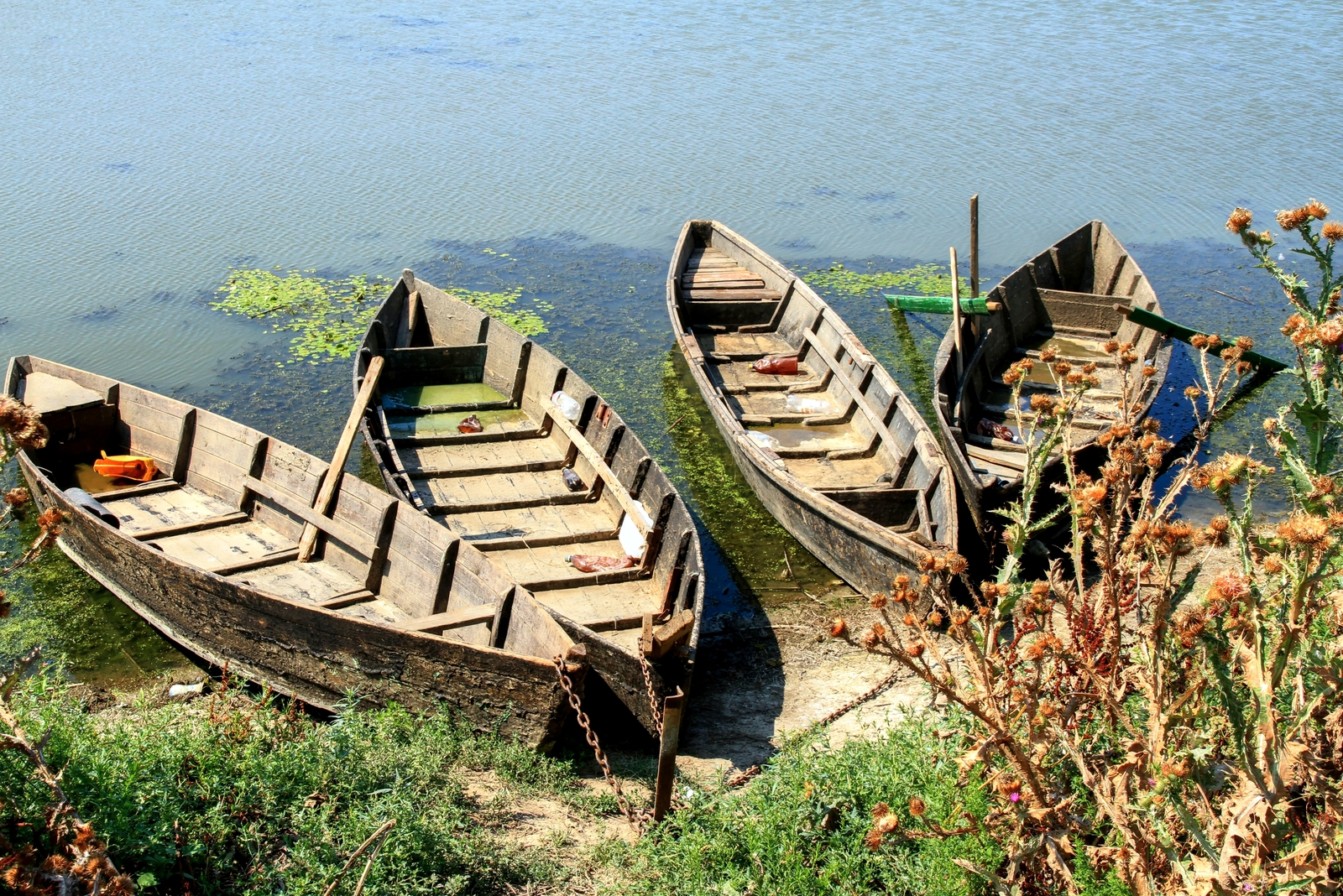 Озера Нижнего Прута (№ 1029 в Рамсарском списке), монумент природы, находится в Район Кахул (код MD-CH-zu-001)